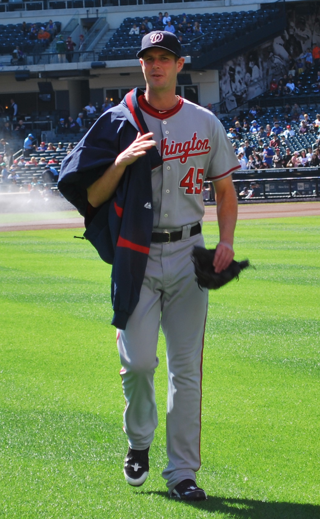 Doug Slaten